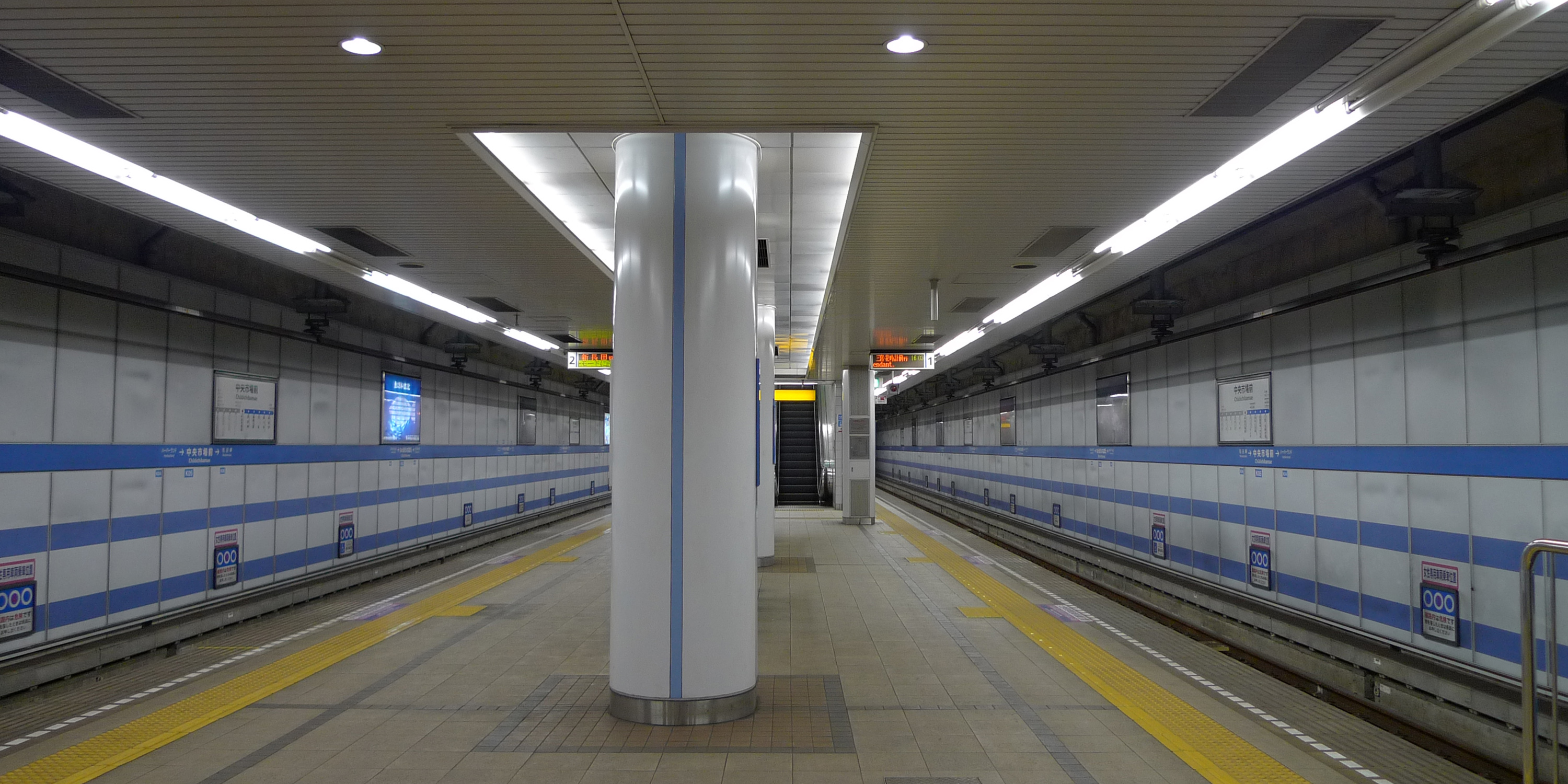 神戸市営地下鉄海岸線中央市場前駅ホーム